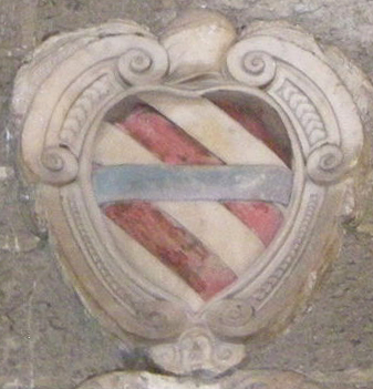 Palazzo dei priori di volterra, interno, stemma corsini2